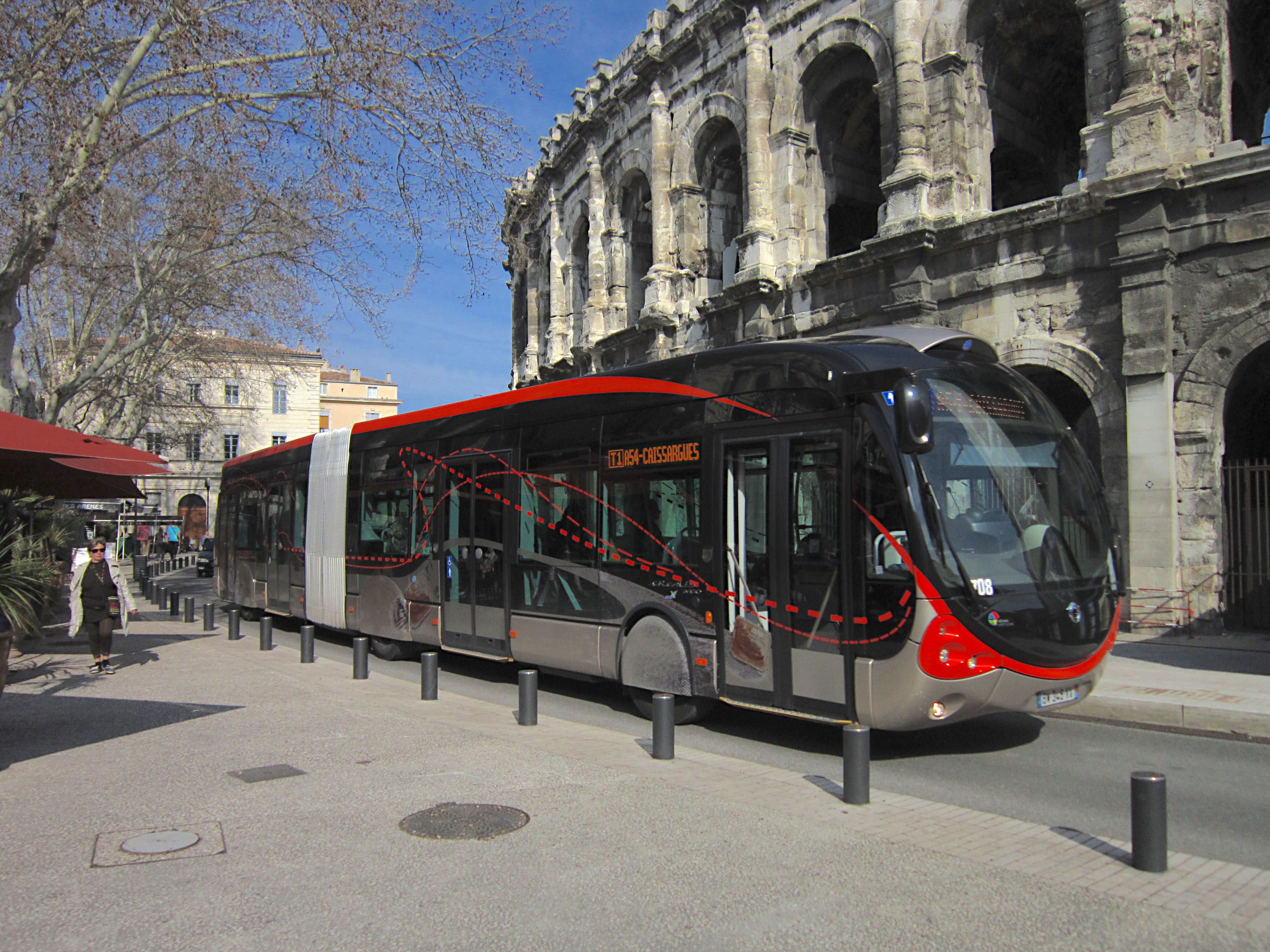 Irisbus Crealis Neo 18 sur la ligne T1 du BHNS à Nîmes.